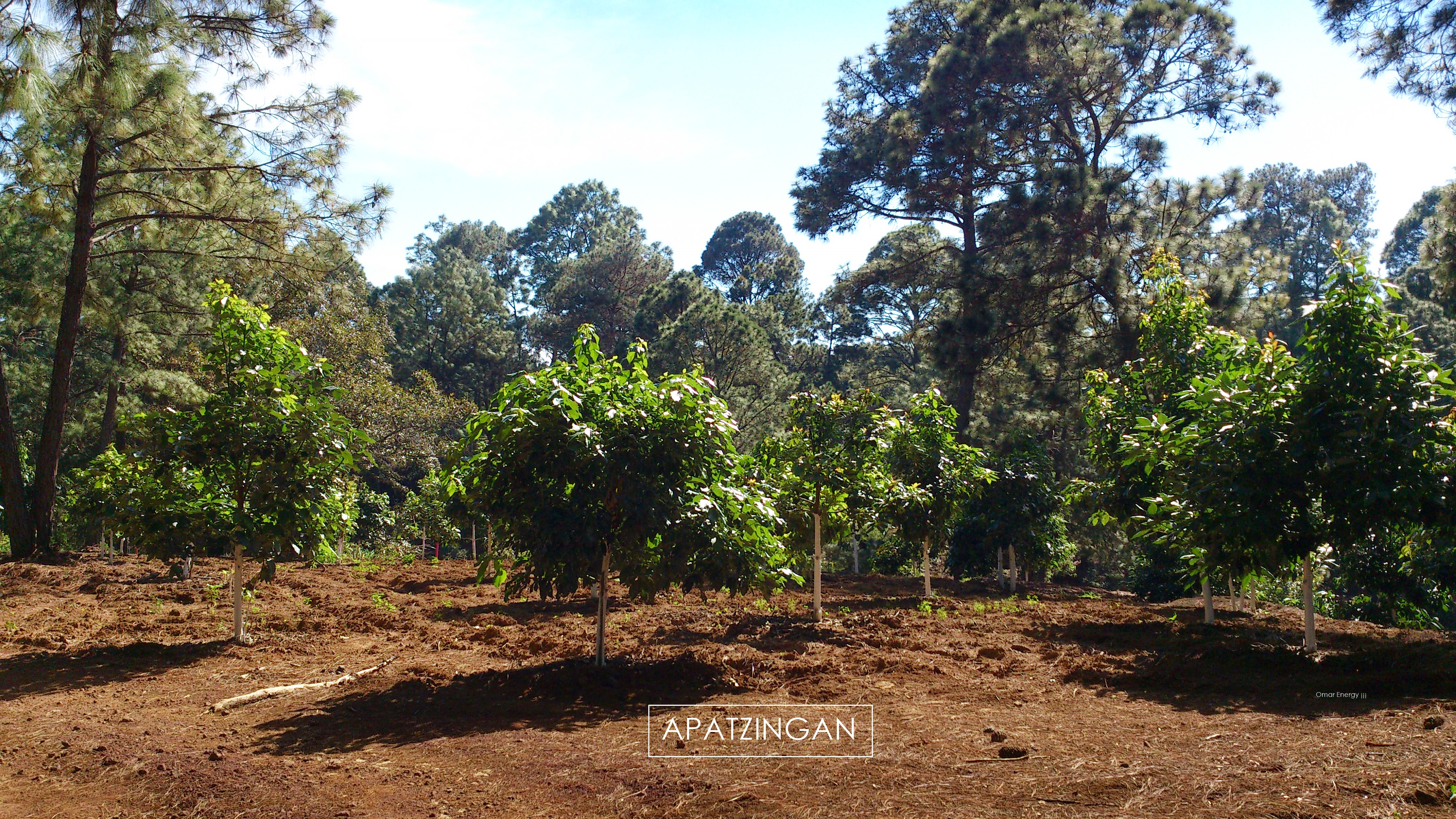 Aguacates de Apatzingan. Búscame en Facebook y en Youtube como Omar Energy ¡¡¡ .